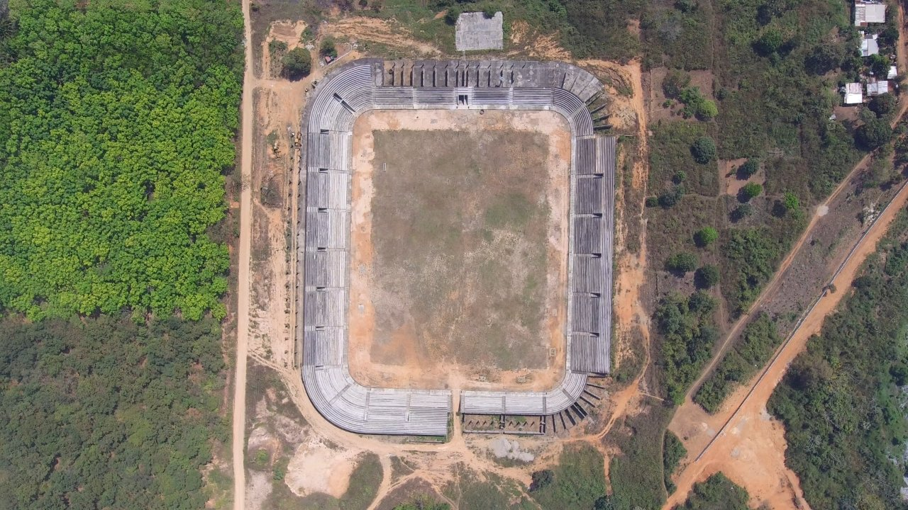 Vista aérea del Estadio Gustavo Pacheco Villaseñor